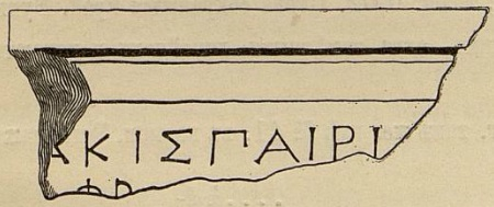 Отбитая верхняя часть мраморного пьедистала с карнизом с трёх сторон и с круглым углублением сверху для статуи. Надпись: посвящение Афродите сделаное Акией, дочью Перисада. Найдено в Геромассе.